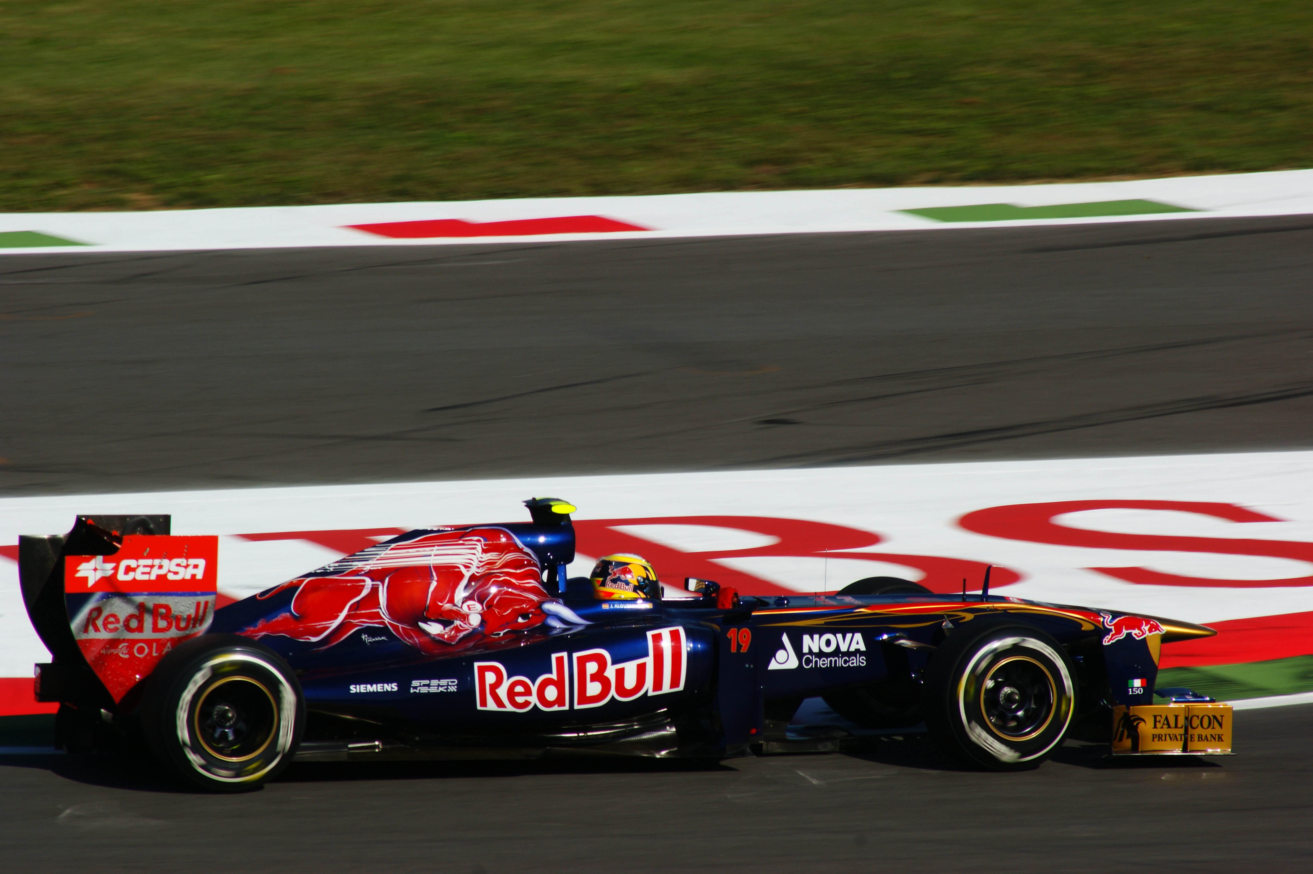 Jaime Alguersuari alla prima variante Monza 2011